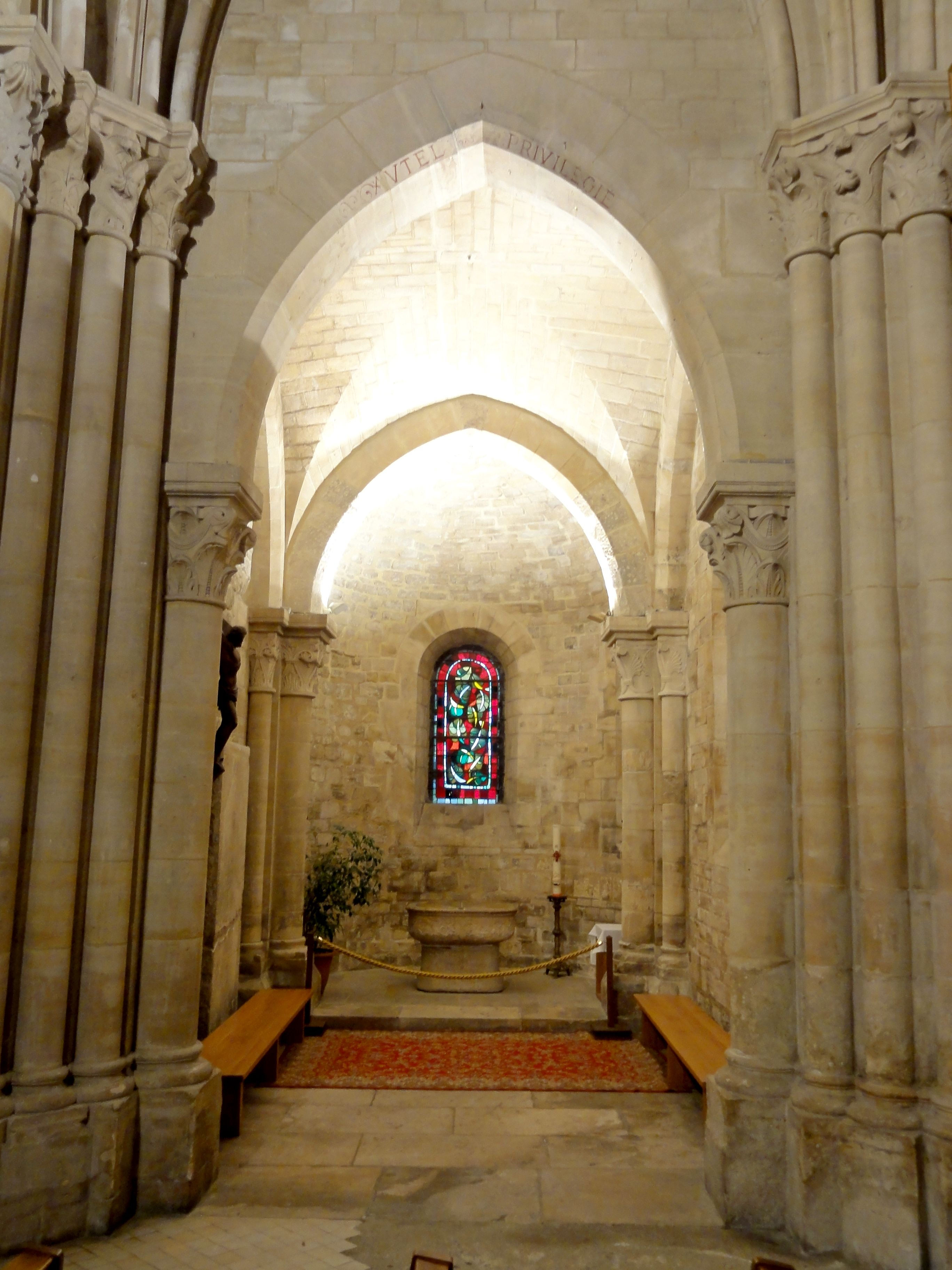 Croisillon sud, côté est.